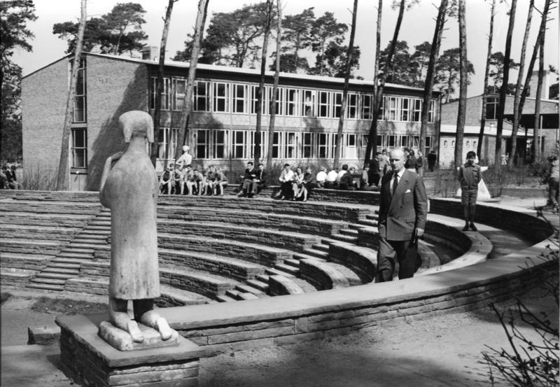 Freiluftheater, im Hintergrund die Berufsschule mit landwirtschaftlicher und hauswirtschaftlicher Abteilung. Information added by Wikimedia users.Schuldorf Bergstraße in Seeheim-Jugenheim, Hessen Freilichtbühne des Schuldorfs Bergstraße, Seeheim-Jugenheim